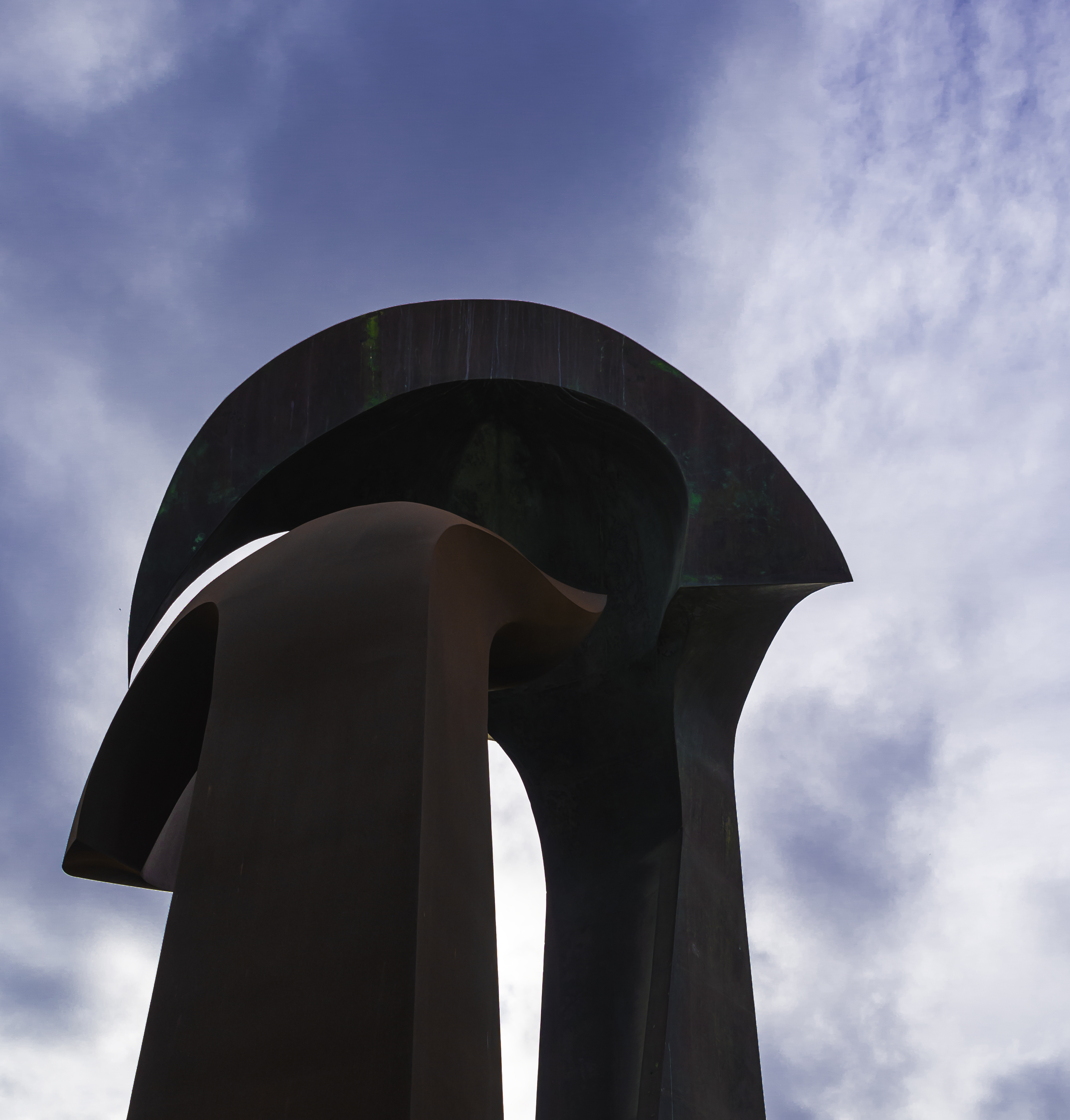 Encuentros (Escultura), 1997 Conmemoración del V Centenario de la fundación española de Melilla.